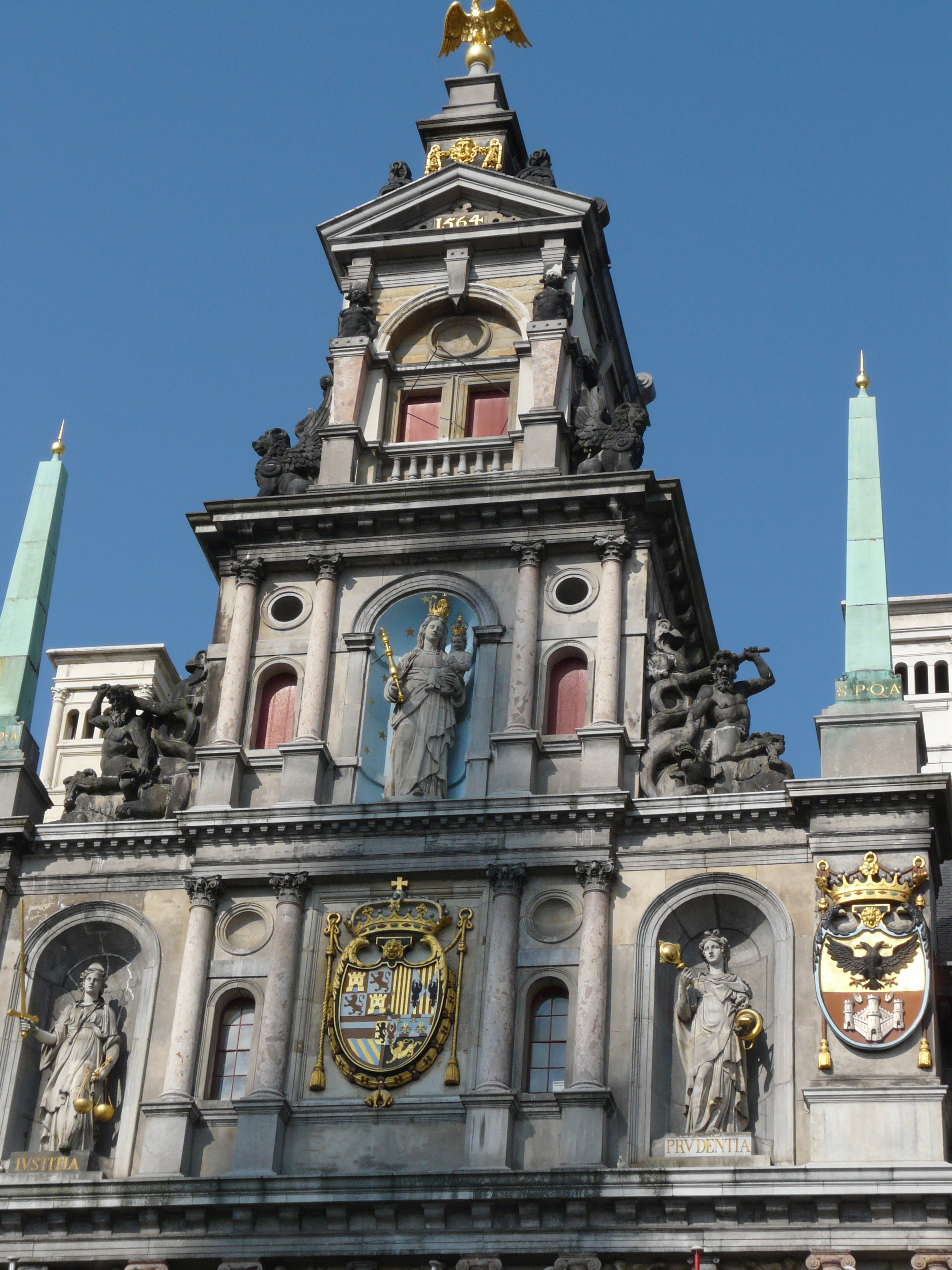 Stadhuis Antwerpen